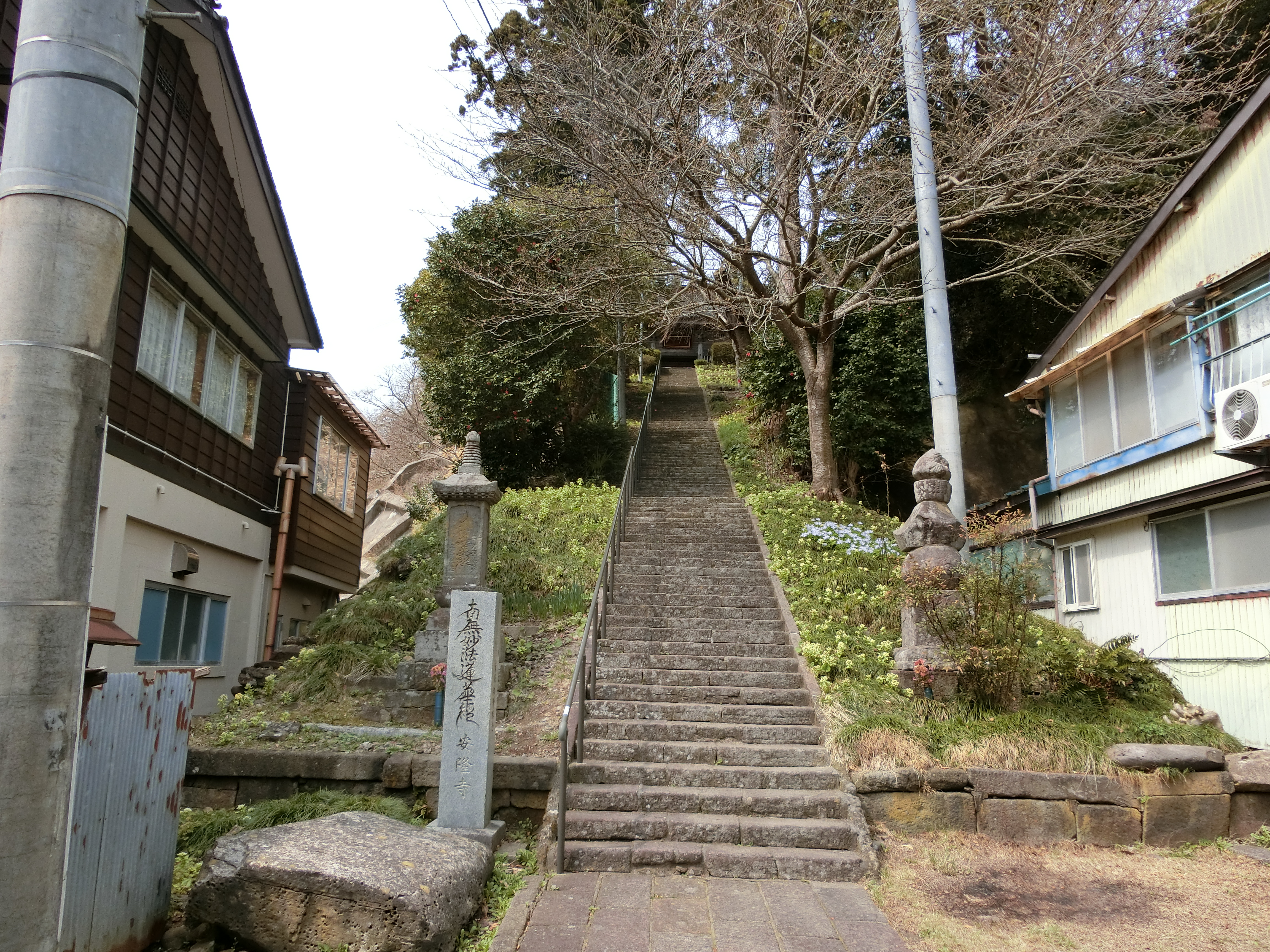 佐渡市の日蓮宗寺院、安隆寺。